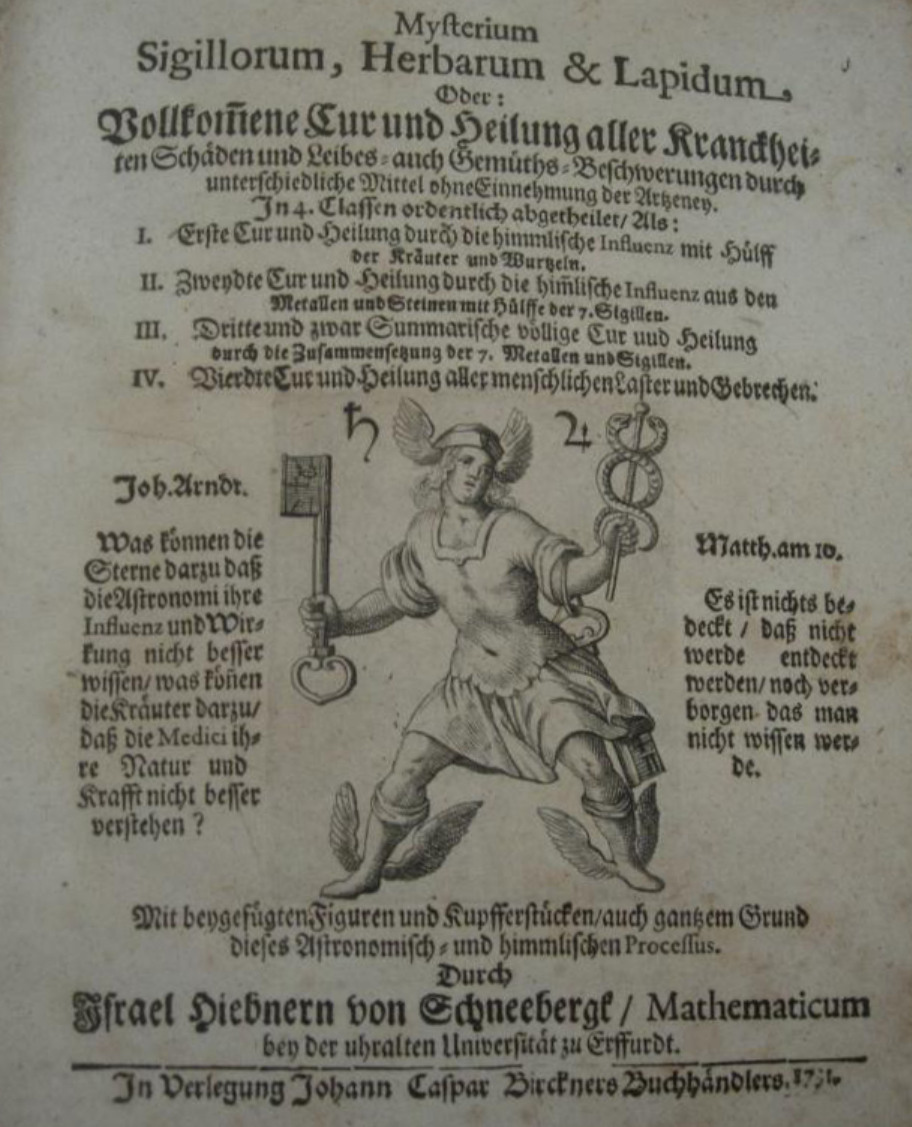 Merkúr (a címlapon)